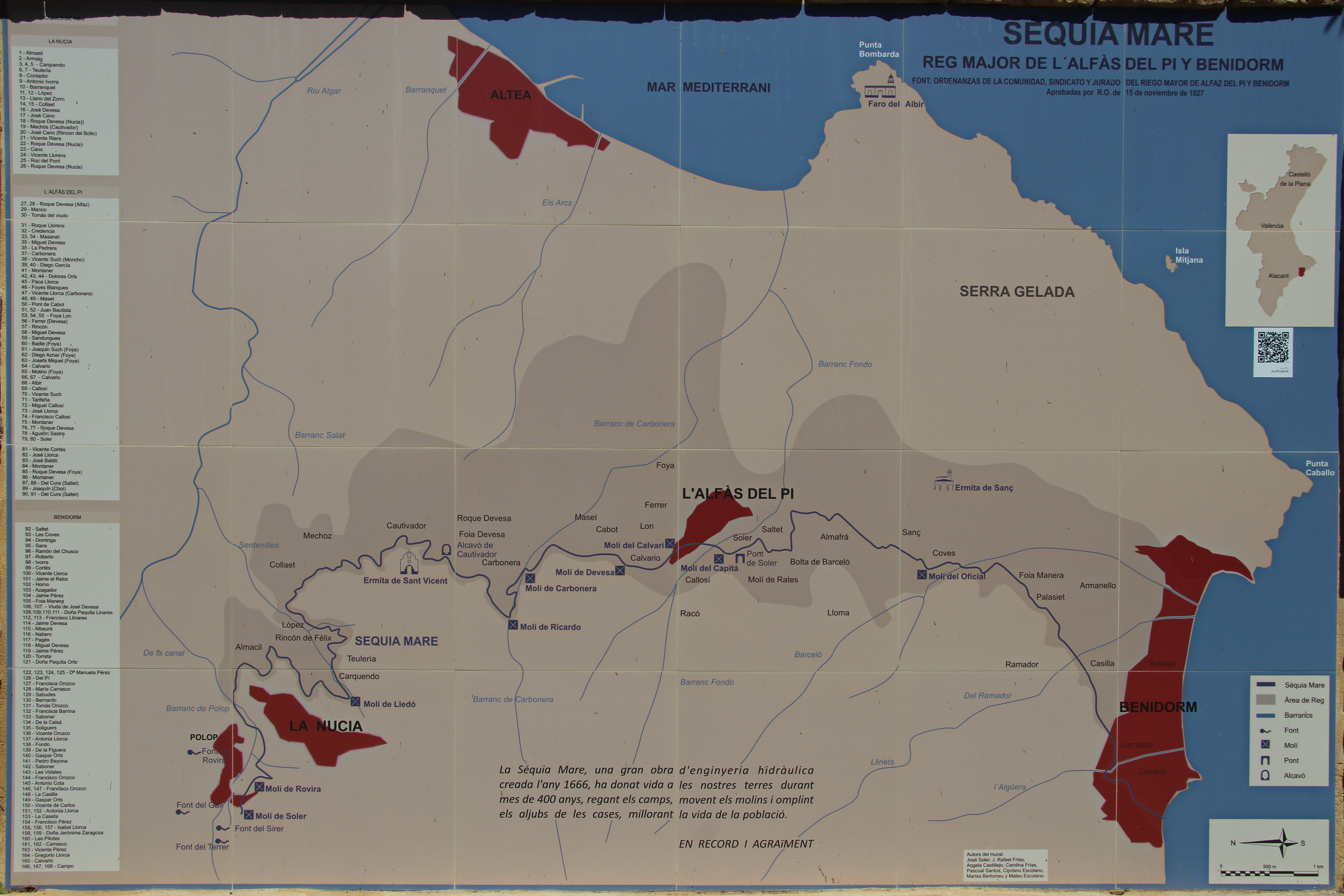 Loop van de Sequia Mare afgebeeld op een tegelplateau in El Centro Educativo Medioambiental (CEM) El Captivador de La Nucía.